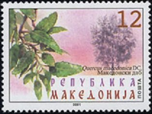 Quercus trojana